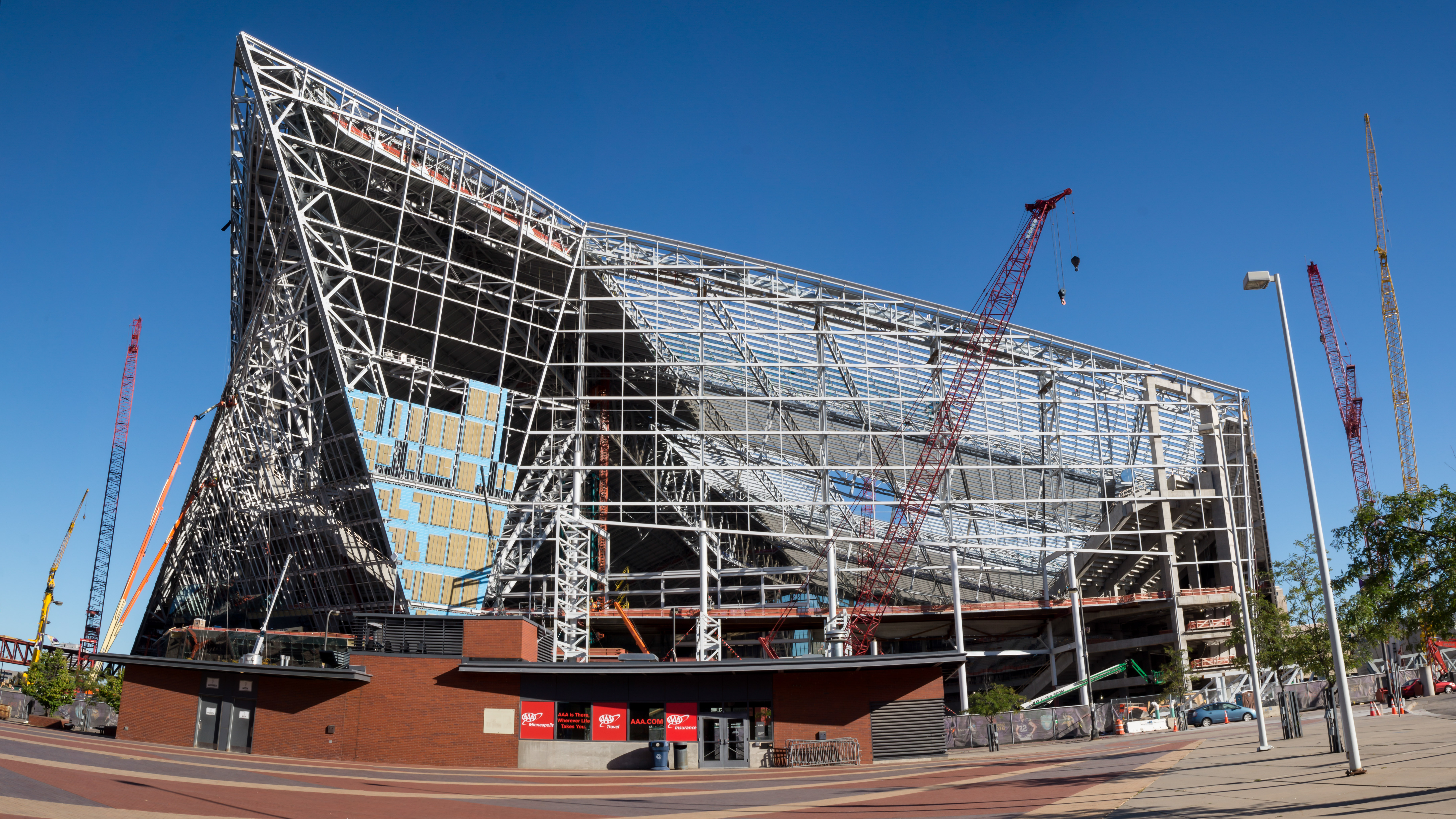 Vikings_Panorama1